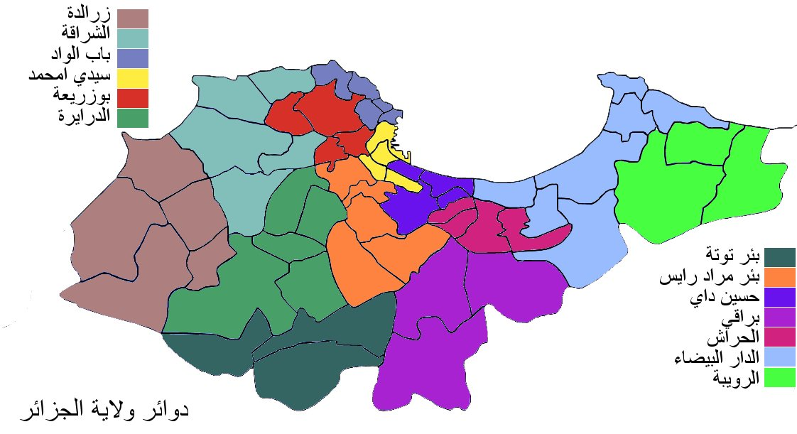 Daira de la Wilaya d'Alger - دوائر ولاية الجزائر (Traduction - ترجمة)